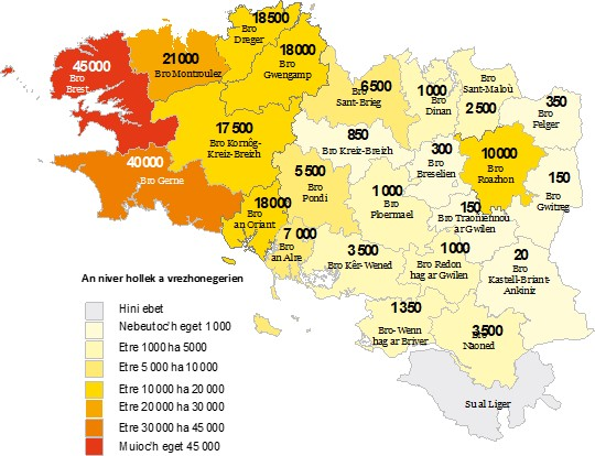 Mammenn : sontadeg 2018 + OPAB